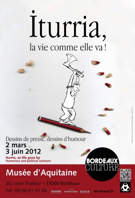 ITURRIA "As life goes by" Humorous and POLITICAL CARTOONS"